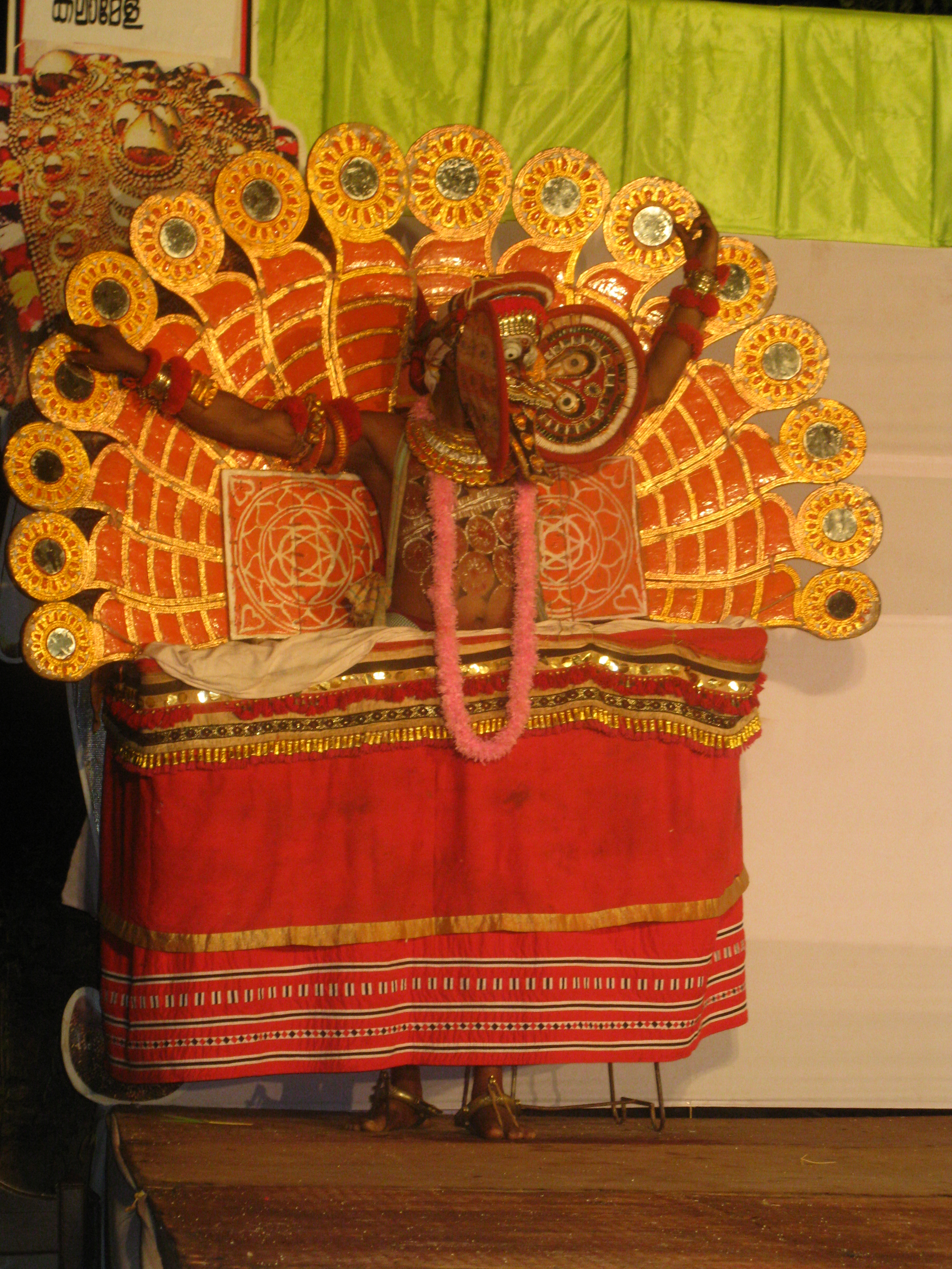 കുട്ടിച്ചാത്തൻ തെയ്യം